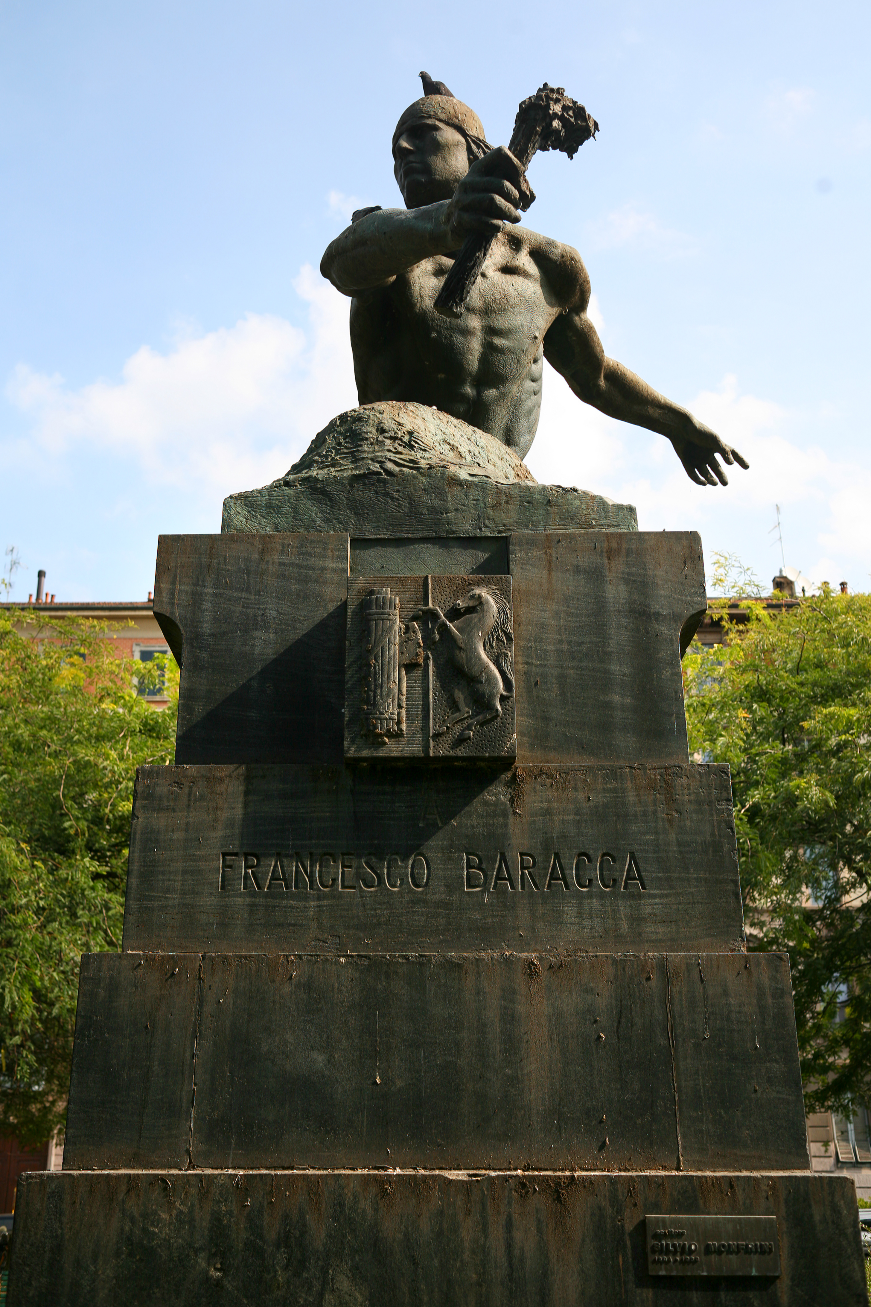 Monumento a Francesco Baracca di Silvio Monfrini (1931), Milano, veduta frontale